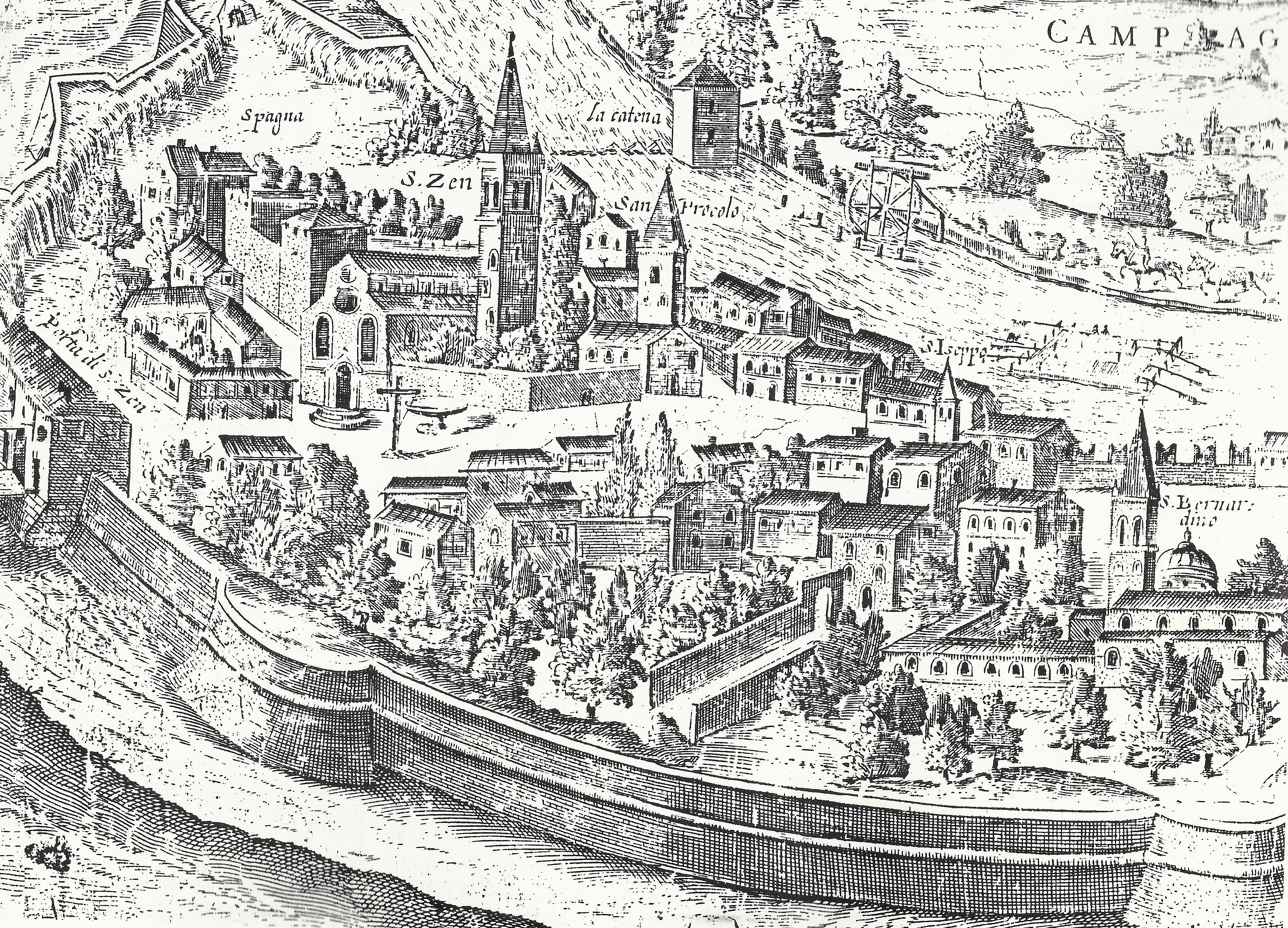 Disegno di Paolo Ligozzi (XVII secolo) che mostra una veduta dell'abbazia di san Zeno a Verona